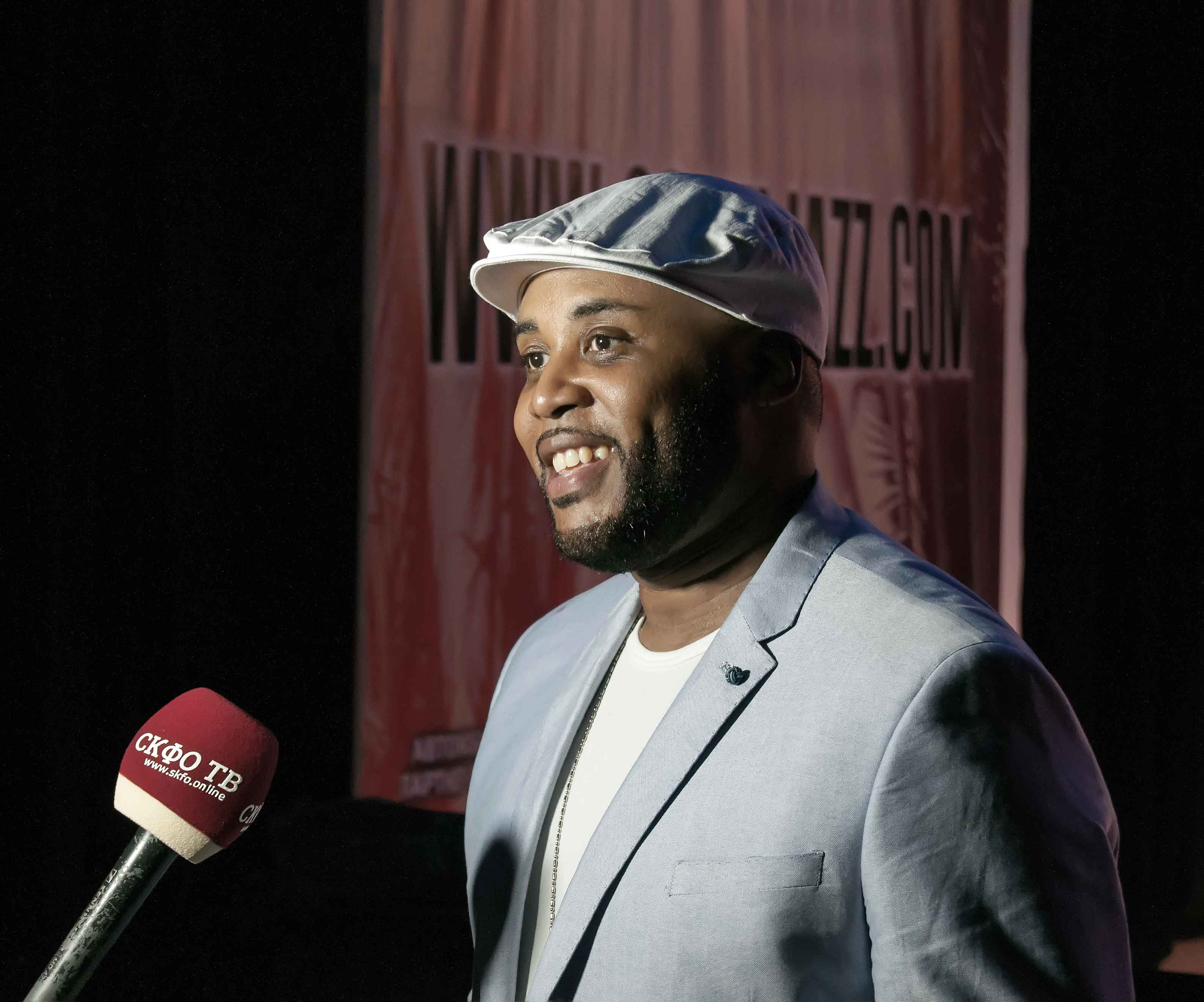 Sochi Jazz Festival